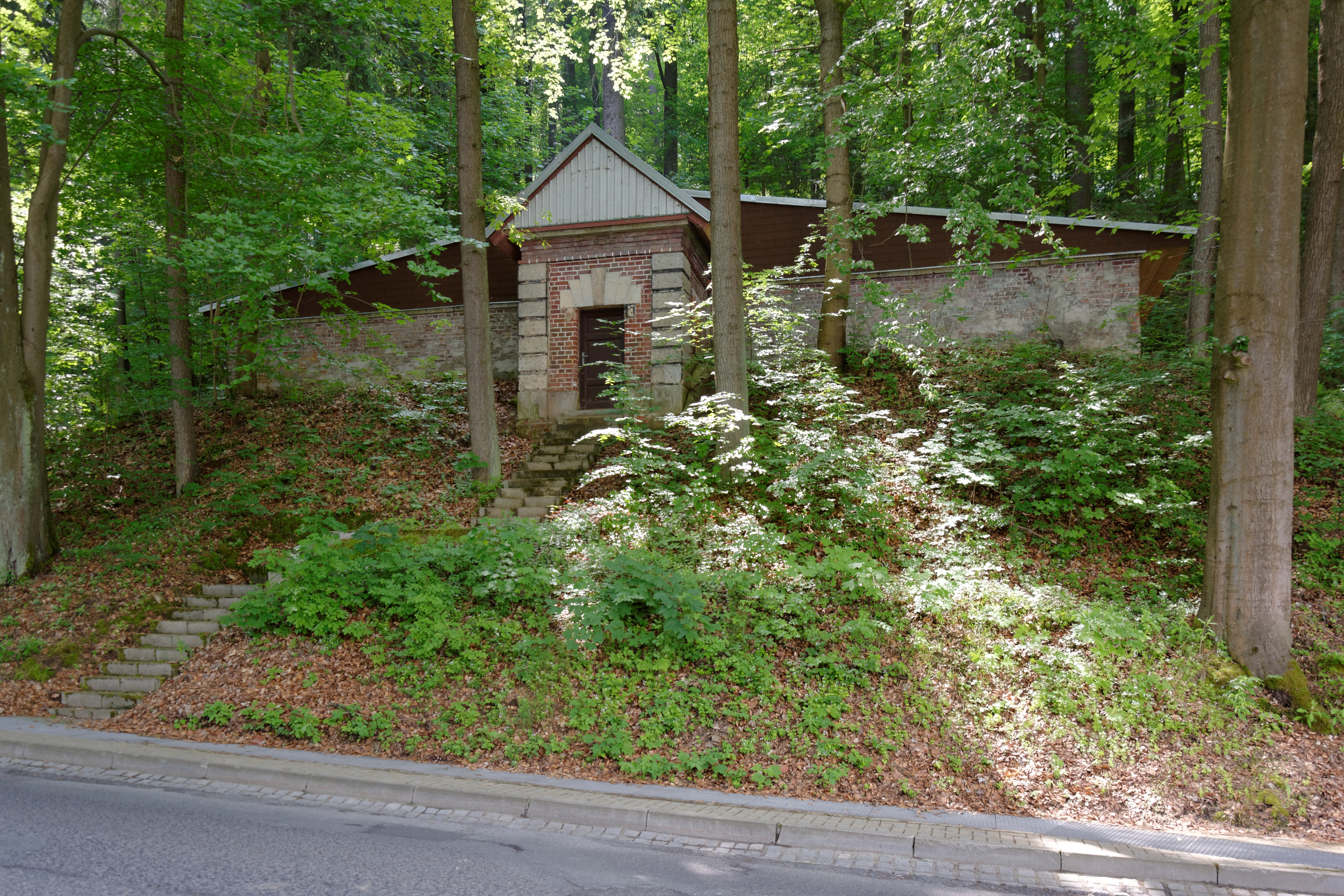 Mariánské Lázně, pramen Hamelika.